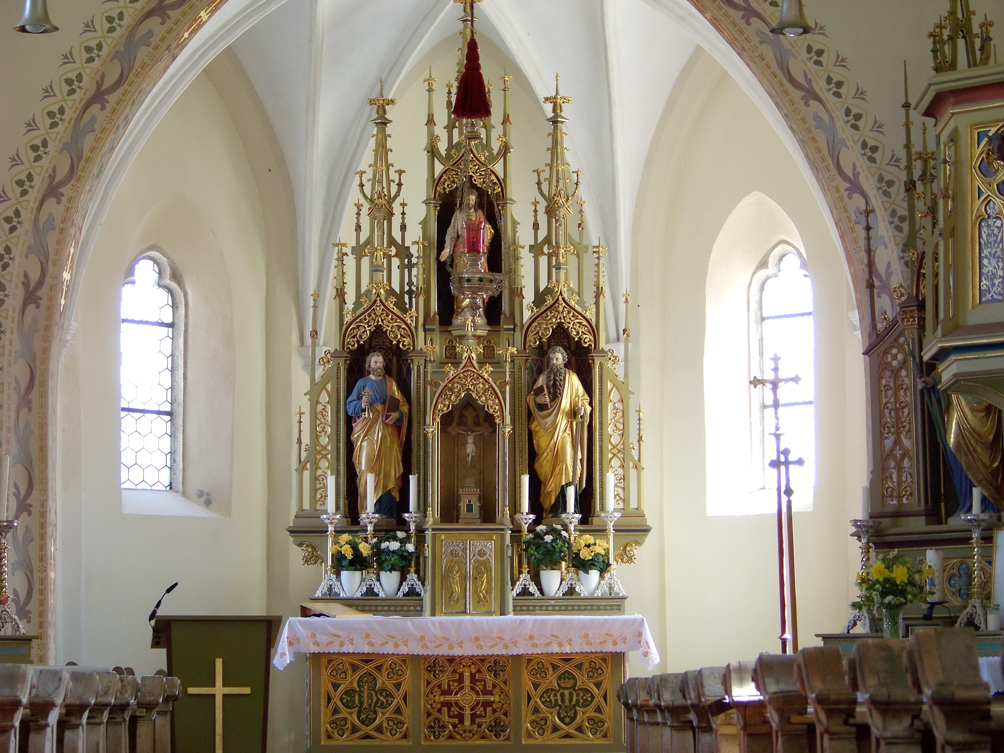 Oberneuhausen, Am Kirchberg 5. Filialkirche St. Peter und Paul. Saalkirche, Langhaus romanisch, Chor spätgotisch aus der zweiten Hälfte des 15. Jahrhunderts. Strebepfeiler und Putzgliederung. Chorraum mit Sternrippengewölbe und neugotischem Altar